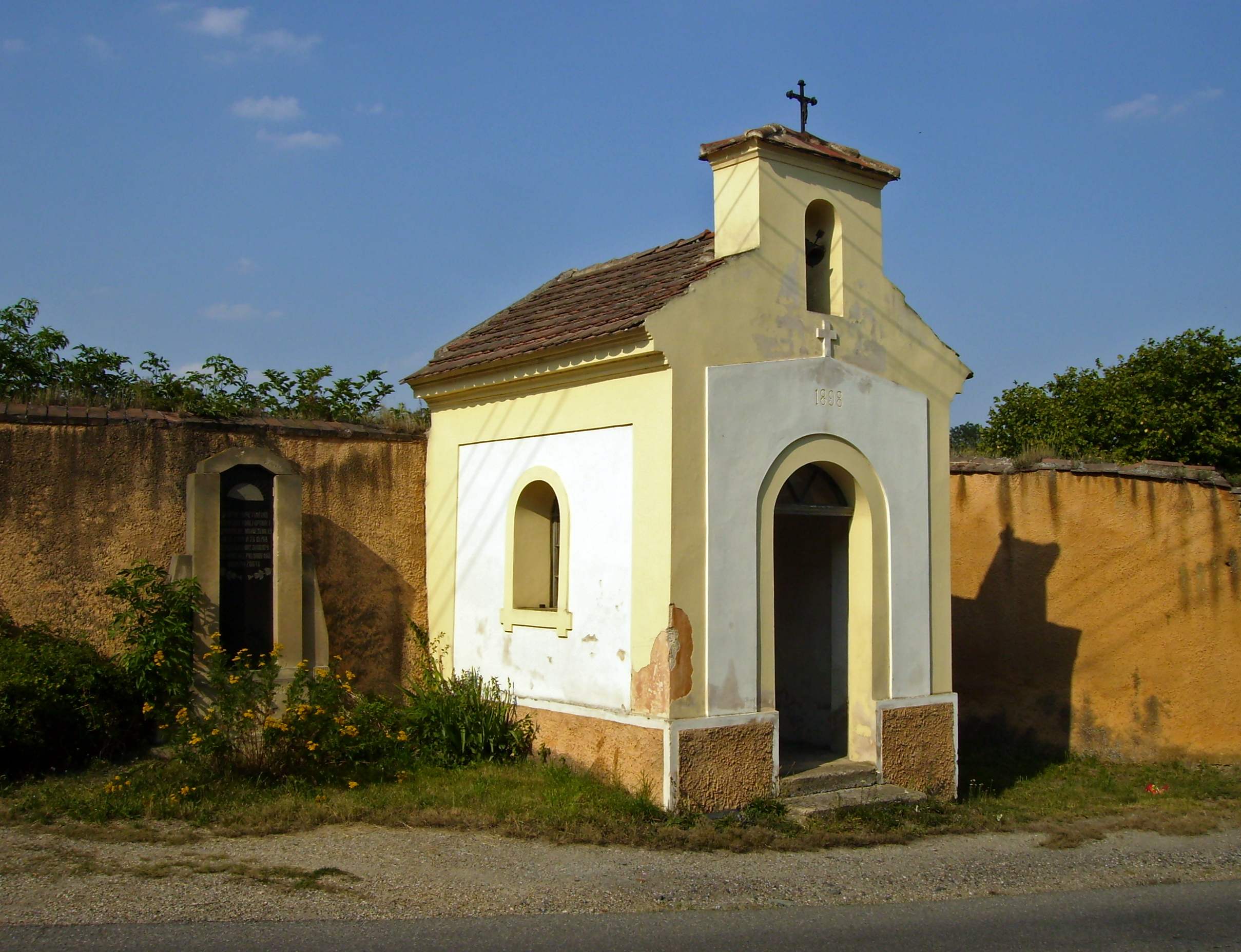 Kaplička v Libochovičkách v okrese Kladno.